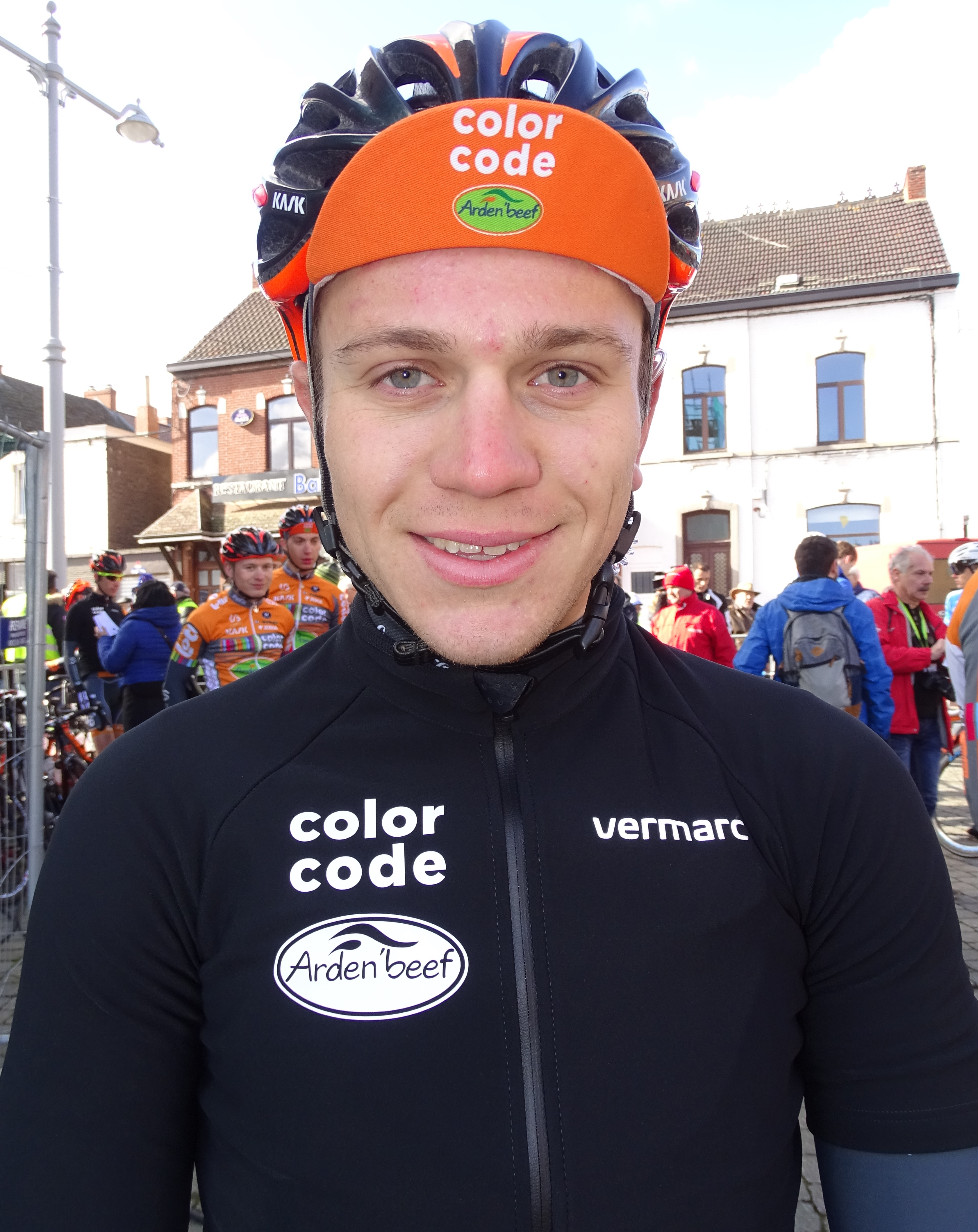 Reportage réalisé le mercredi 2 mars à l'occasion du départ du Samyn des Dames 2016 et du Samyn 2016 à Quaregnon, Belgique.